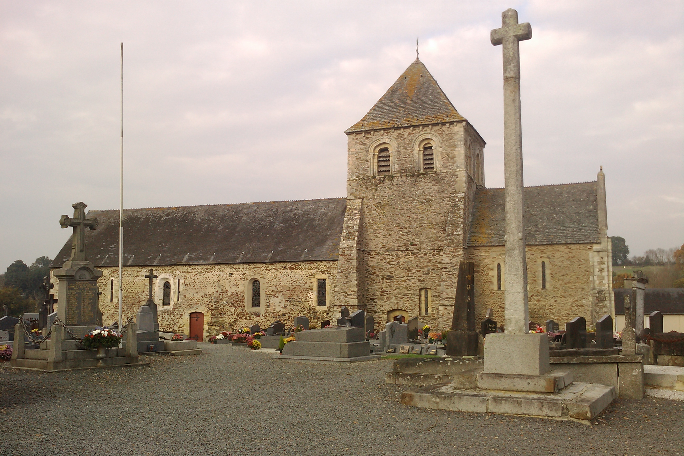 Église Saint-Ébremond de La Barre-de-Semilly